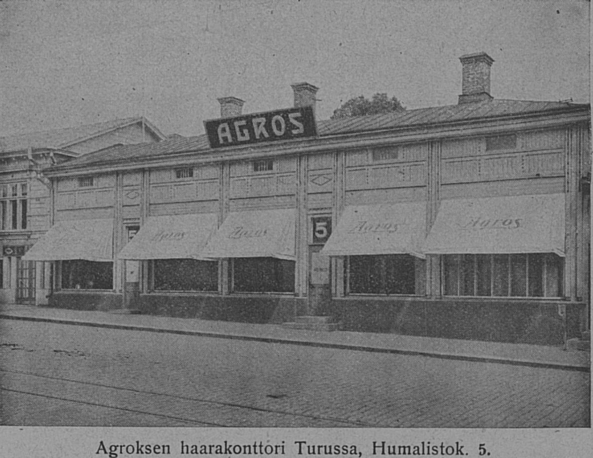 Agroksen haarakonttori Turussa